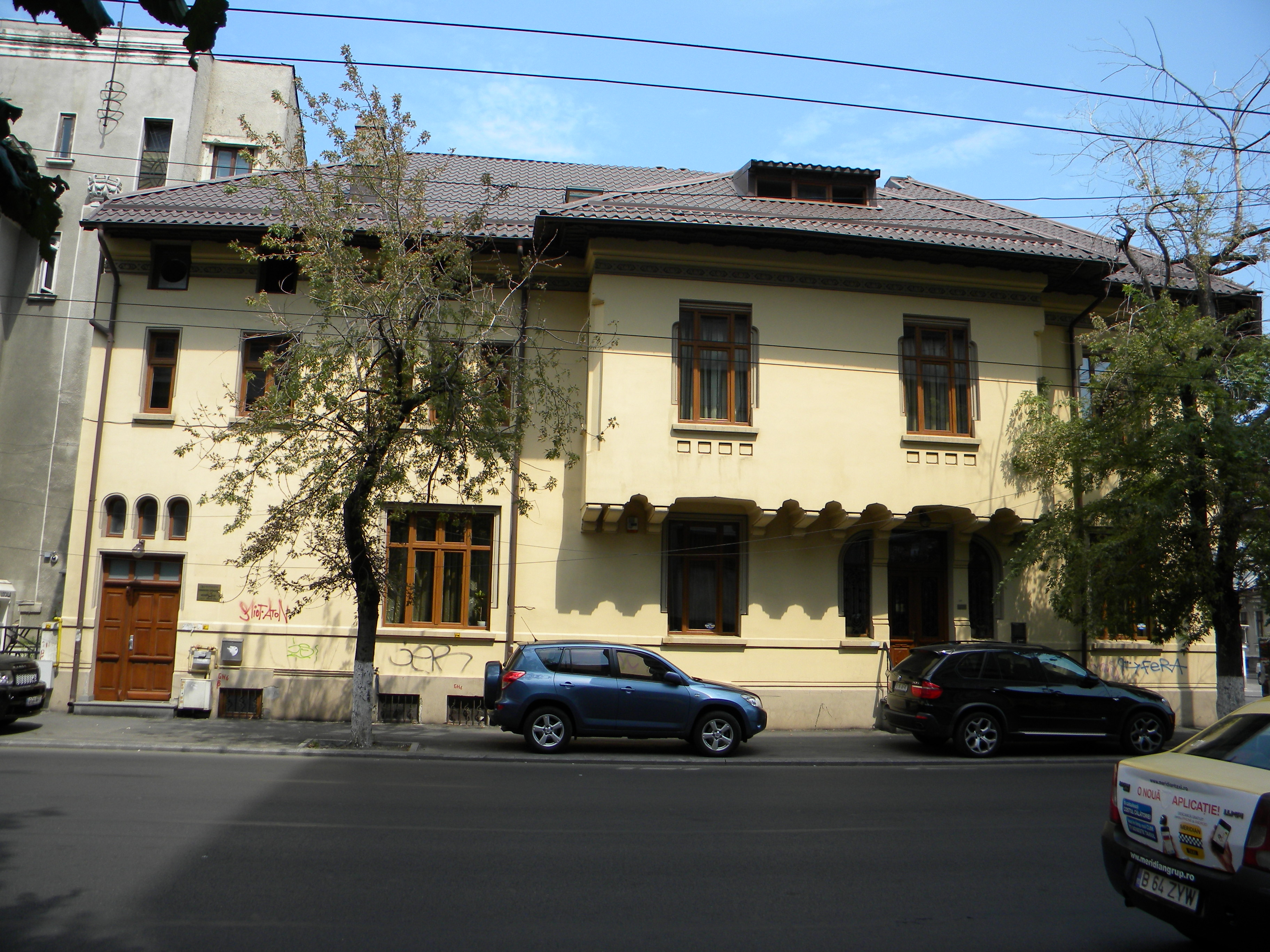 mobil pe Bd. Dacia nr. 107, Bucuresti